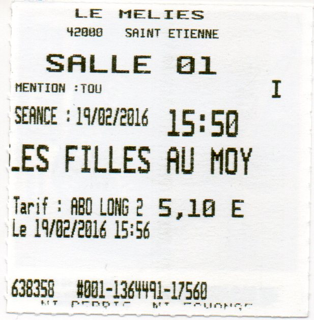 Ticket du cinéma Le Méliès à Saint-Étienne, pour le film français Les Filles au Moyen Âge.